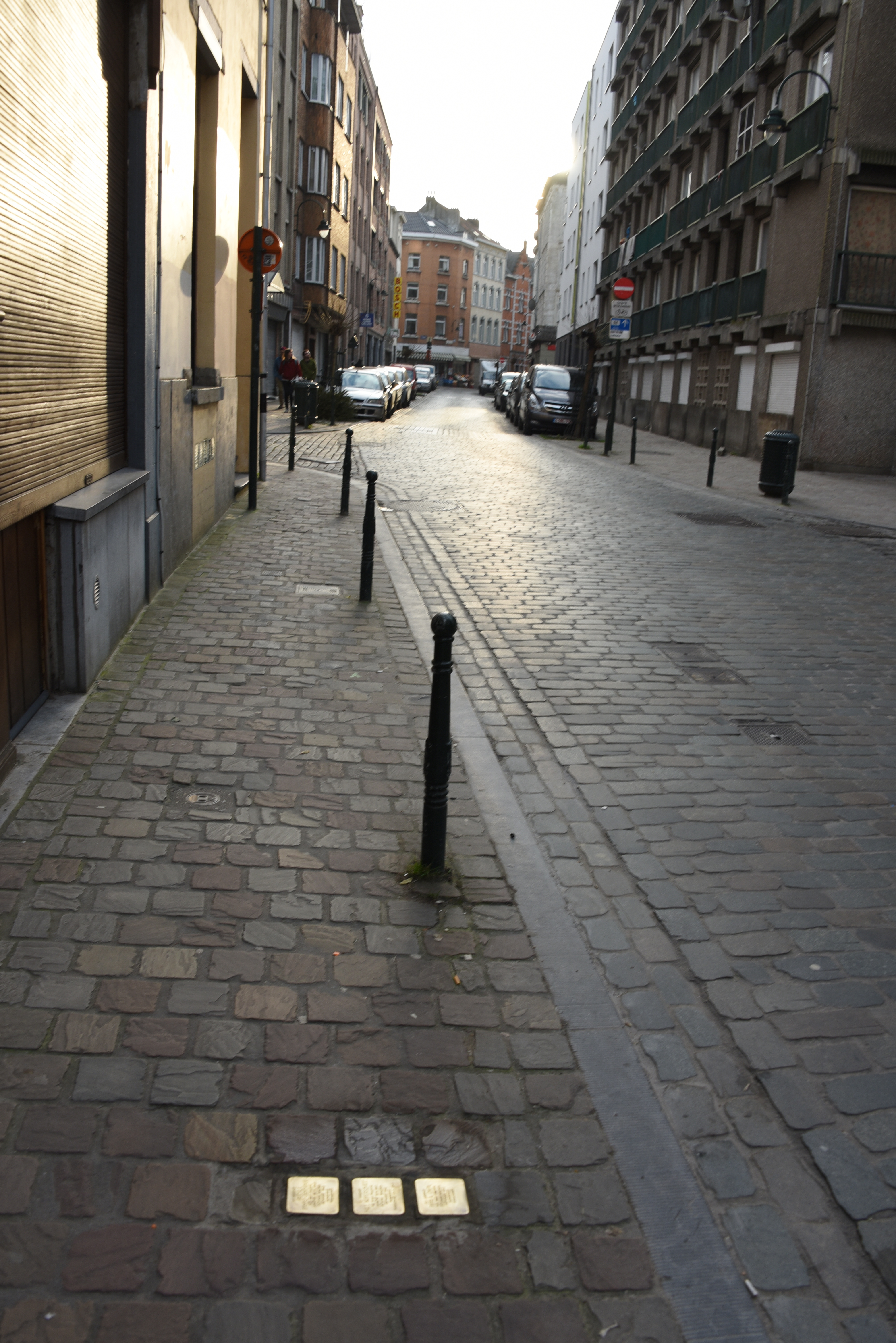 Stolpersteine in Brüssel-Stad